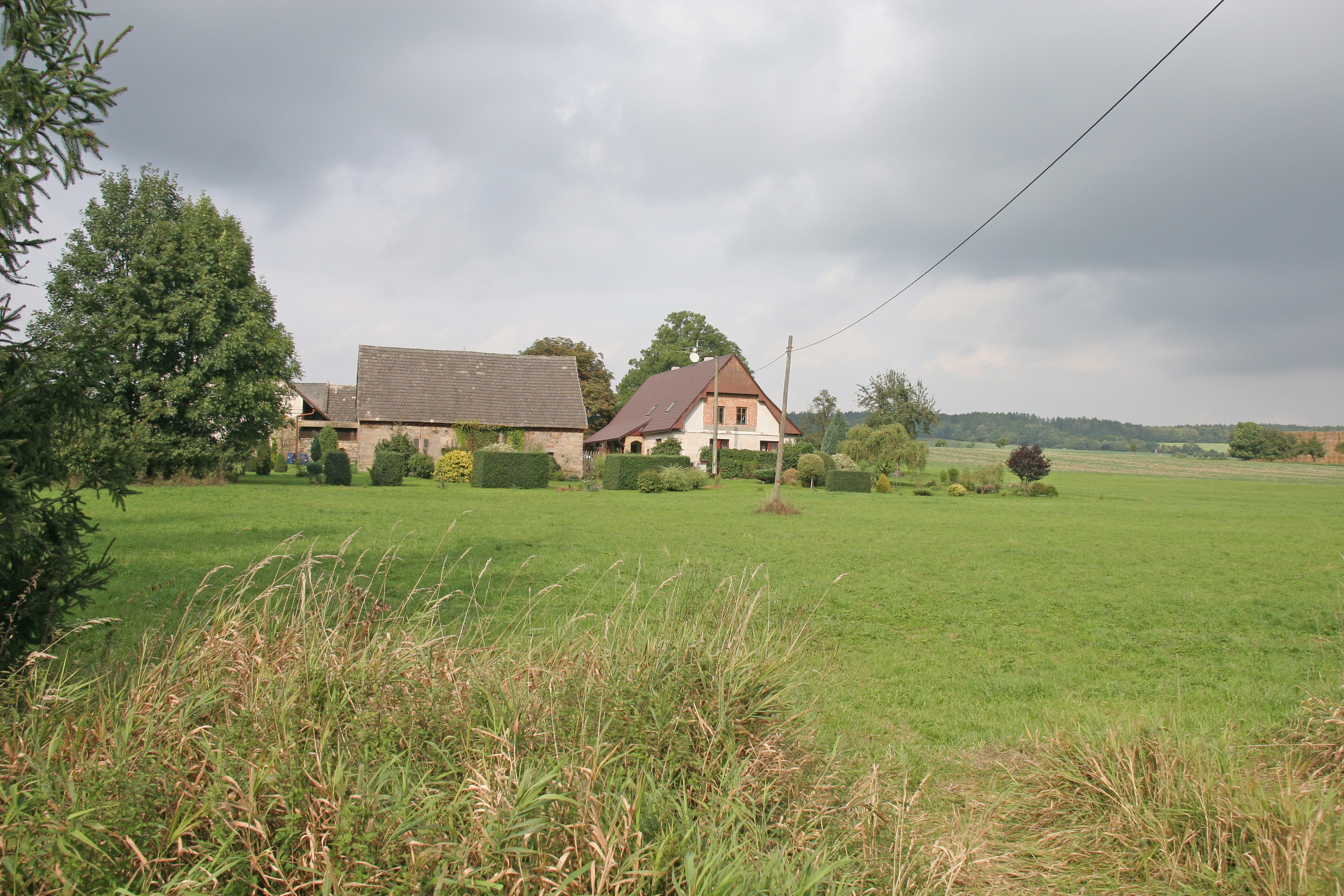 Dolní Vlčkovice čp. 41